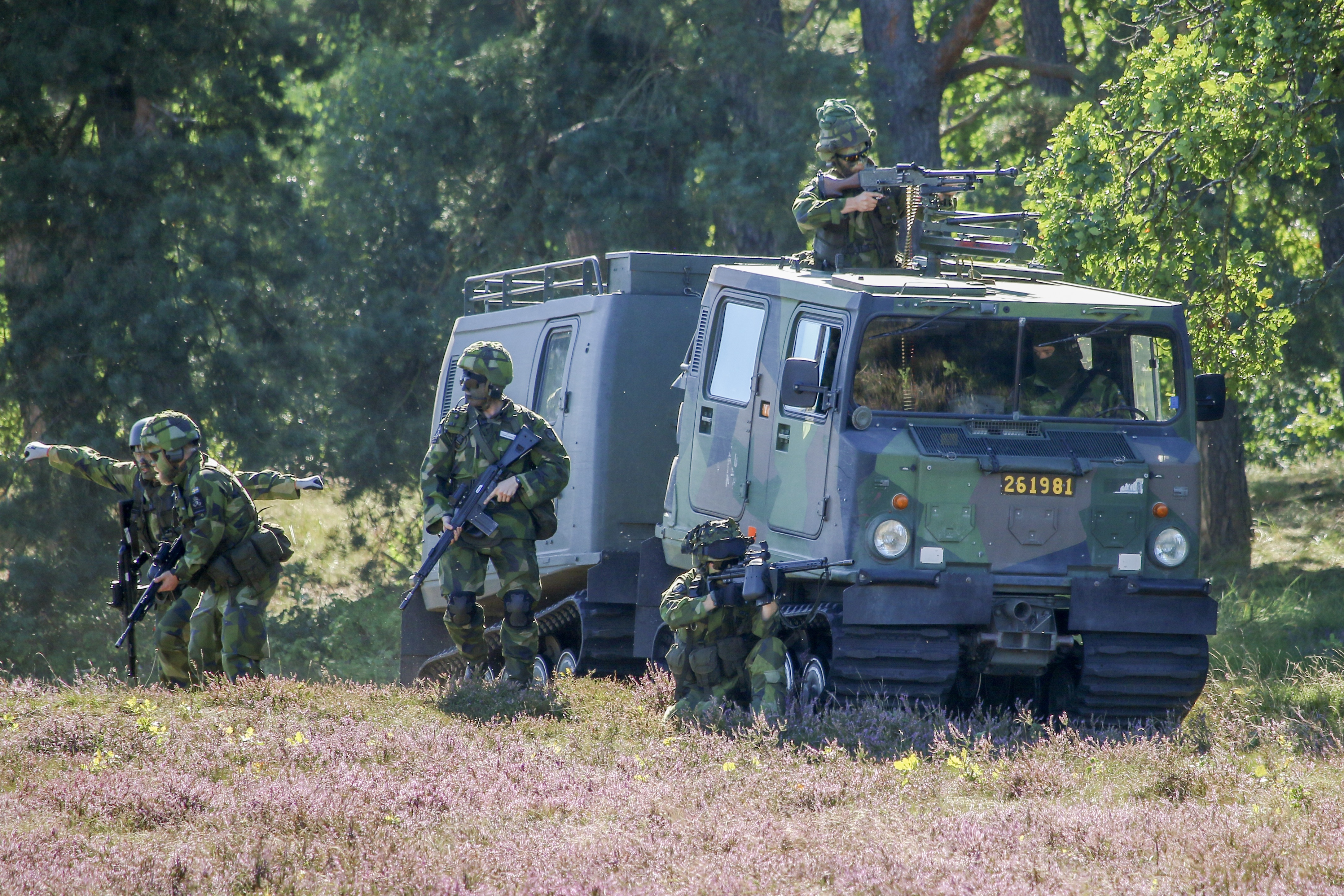 Bandvagn 206 Revinge 2016